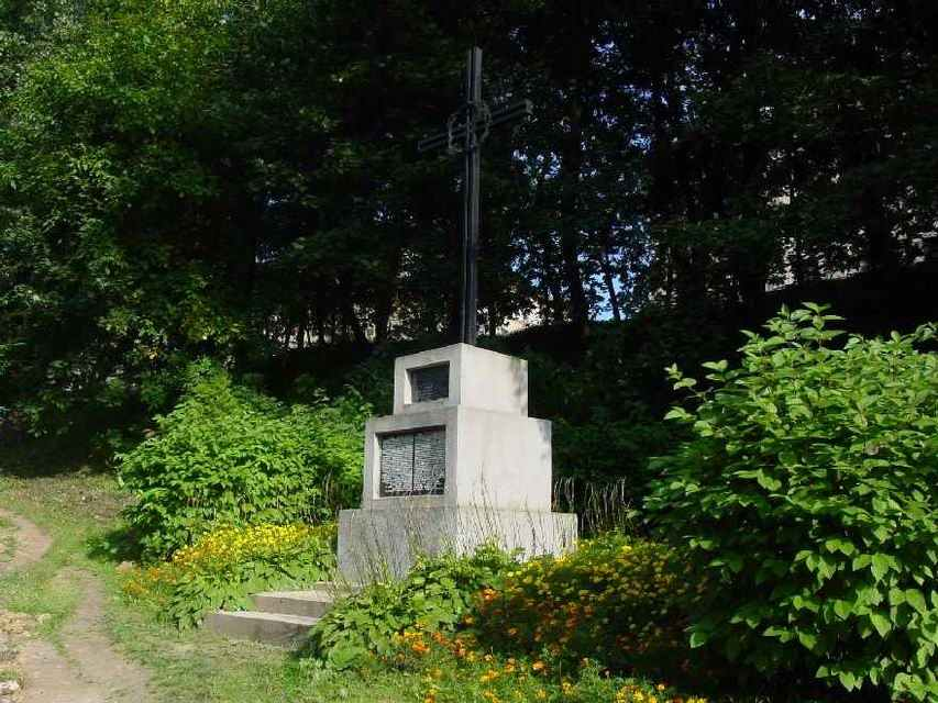 Lwów-Wzgórza Wuleckie. Pomnik zamordowanych Profesorów. Autor: Stanisław Kosiedowski.